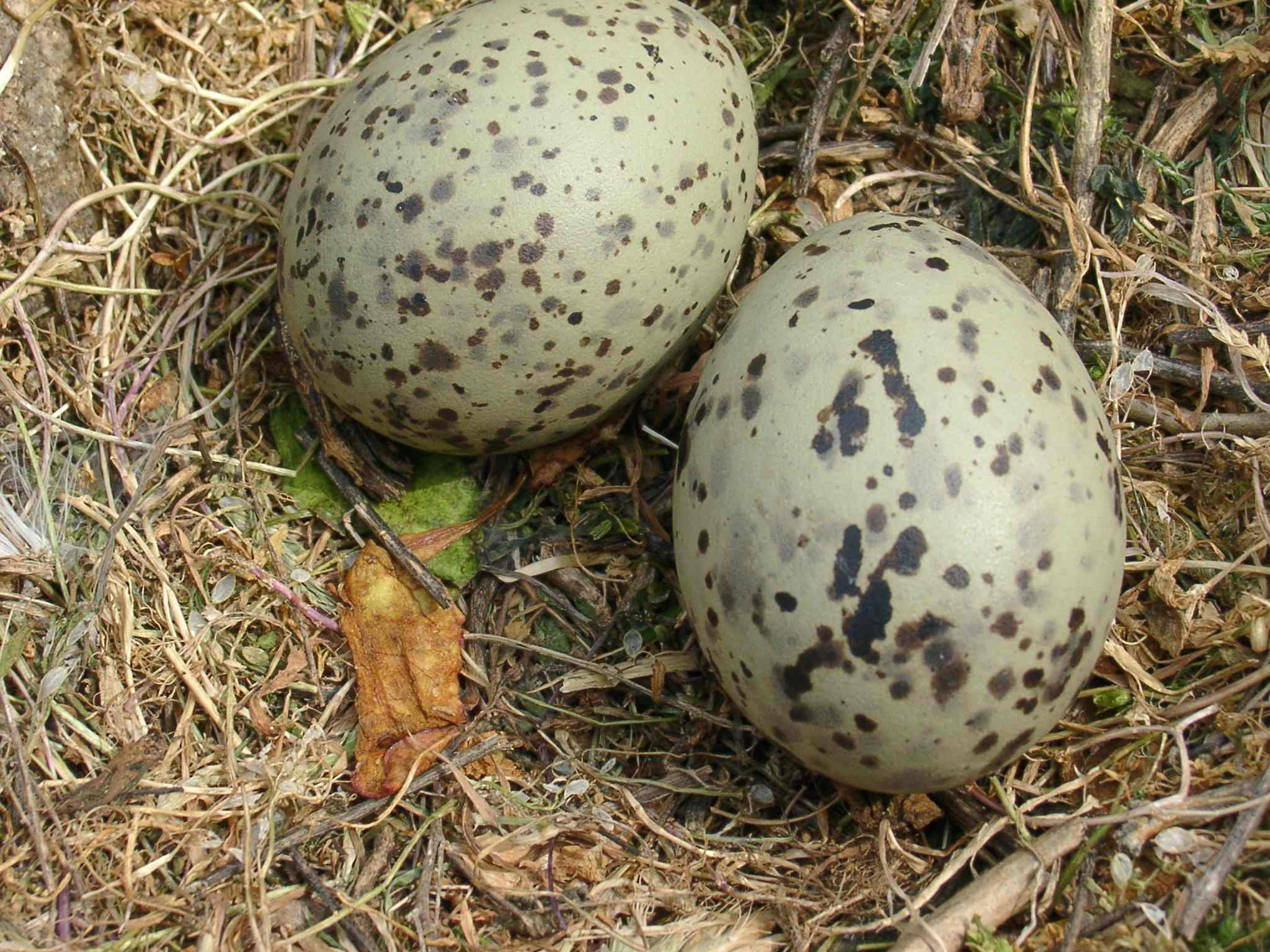 Description : Oeufs de goéland argenté Larus argentatus Lieu : Ile du Loc'h, Archipel des Glénans, Bretagne, France Auteur : Pline Photo personnelle